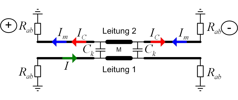 Funktionsprinzip eines Richtkopplers